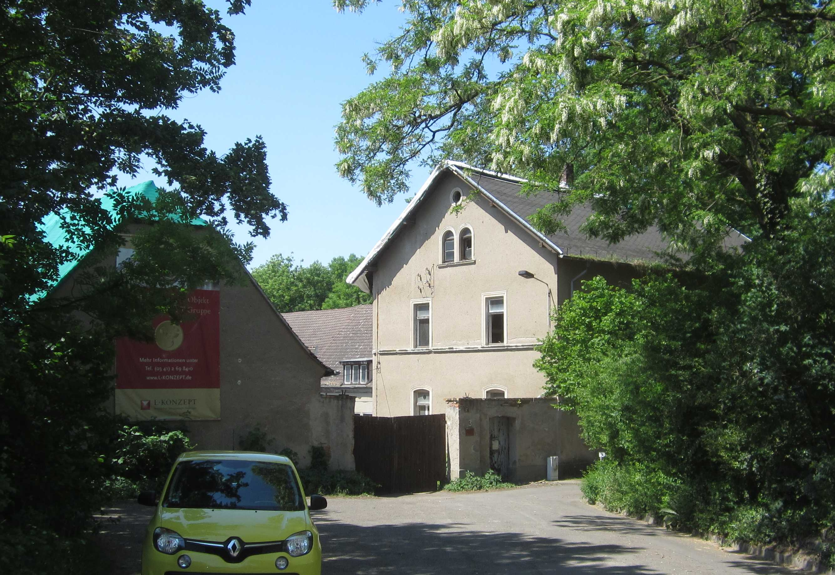 Wohnhaus und Stallgebäude eines Vierseithofes, Altes Dorf 3 in Leipzig